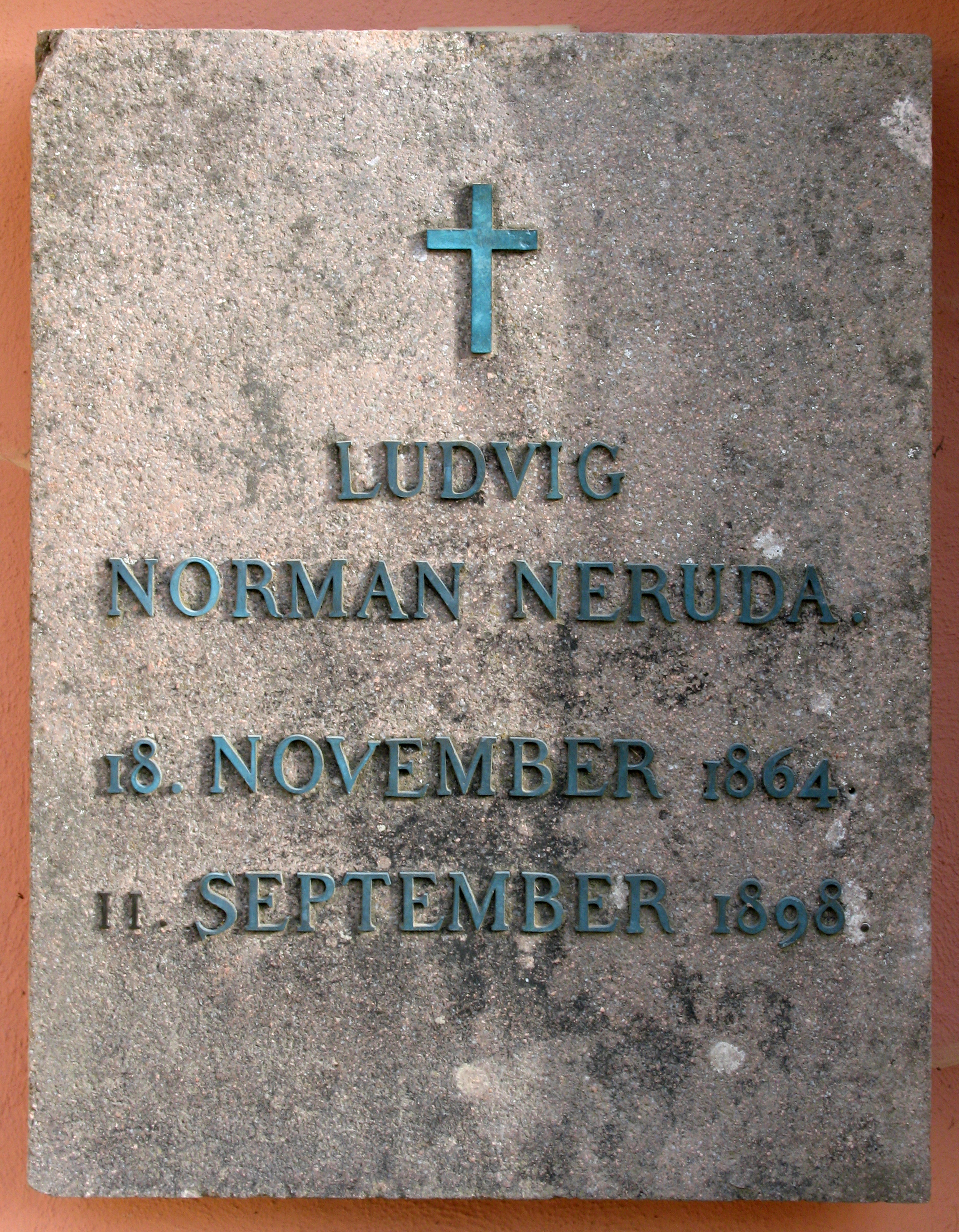 Grabstein des Bergsteiers und Malers Ludwig Norman-Neruda in St. Ulrich in Gröden